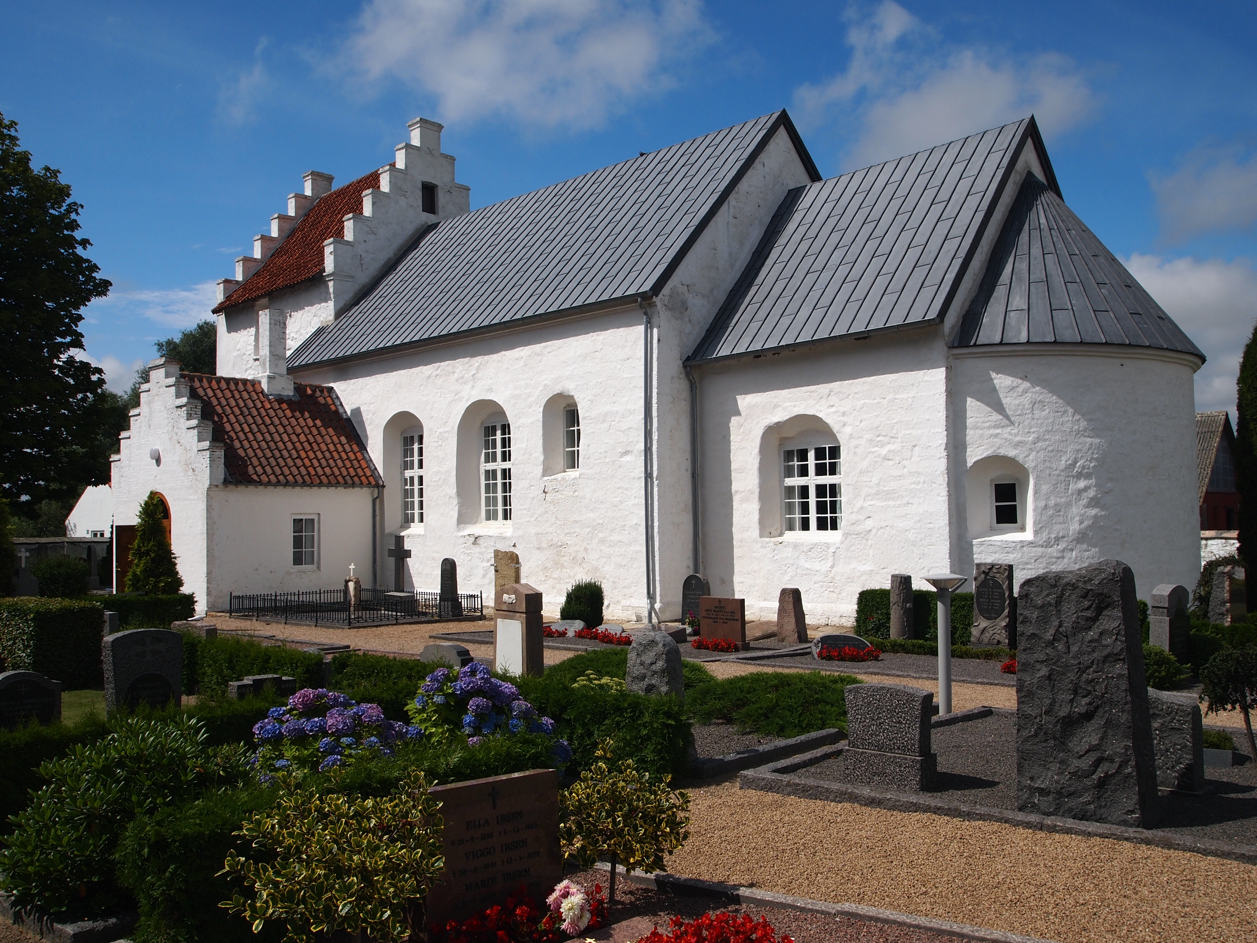 3720 Aakirkeby, Denmark